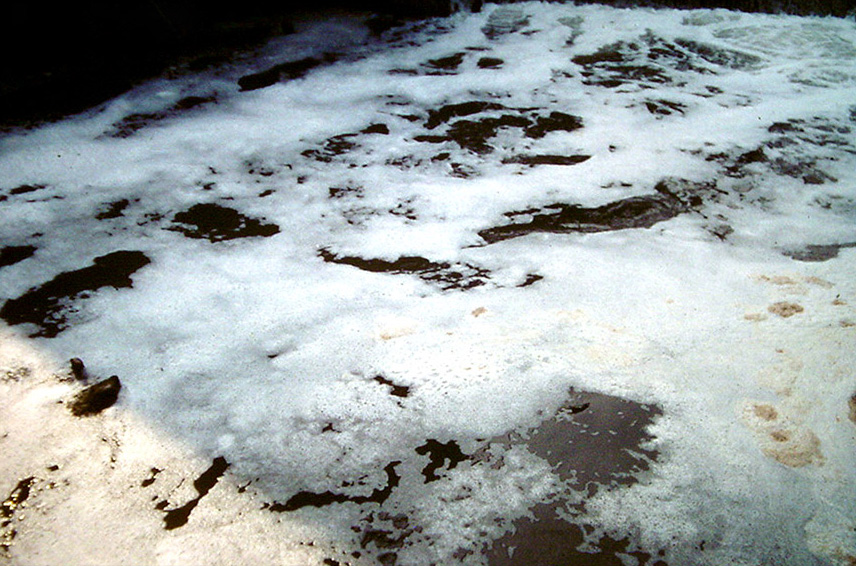 Dans la décennie 1985/1995, l'Aa subit une lourde pollution chronique d'origine industrielle (3 papeteries et d'autres usines) et urbaine (peu de station d'épuration ou station dysfonctinnant). De Blendecques à Arques, l'eau était souvent couverte d'une mousse blanche malodorante et épisodiquement d'hydrocarbures. La dystrophisation était manifeste jusqu'en aval de Saint Omer.